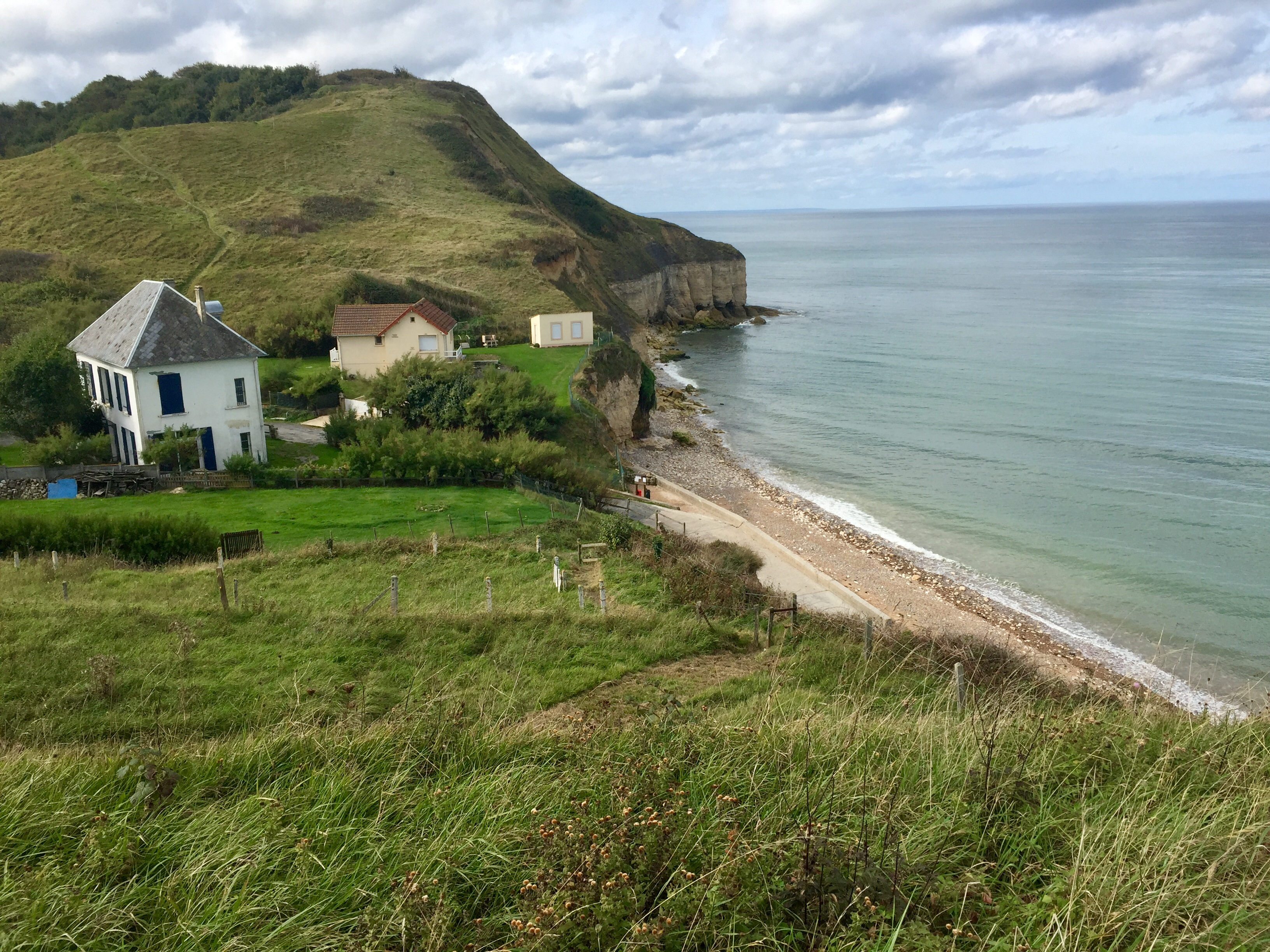 Vue depuis fortifications WN59